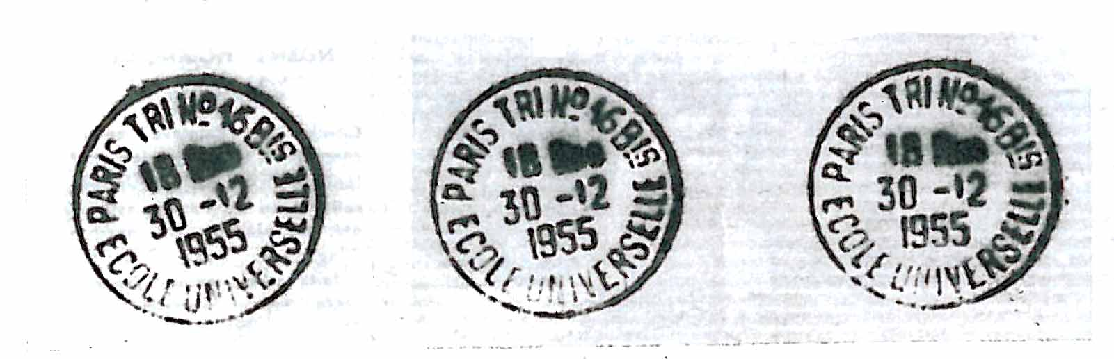 Timbre spécial émis par la poste de l'Ecole Universelle